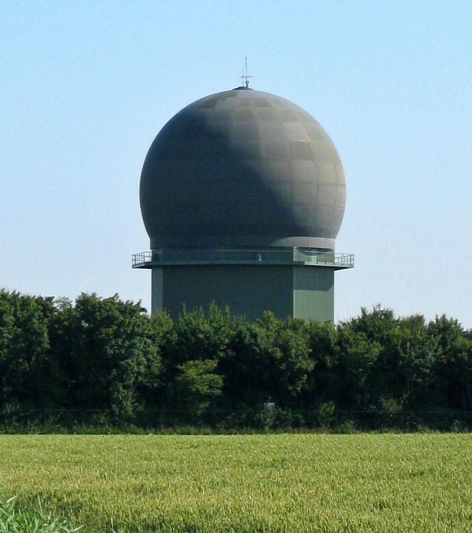 Radarpost Noord Koninklijke Luchtmacht (Wier, Fryslân)